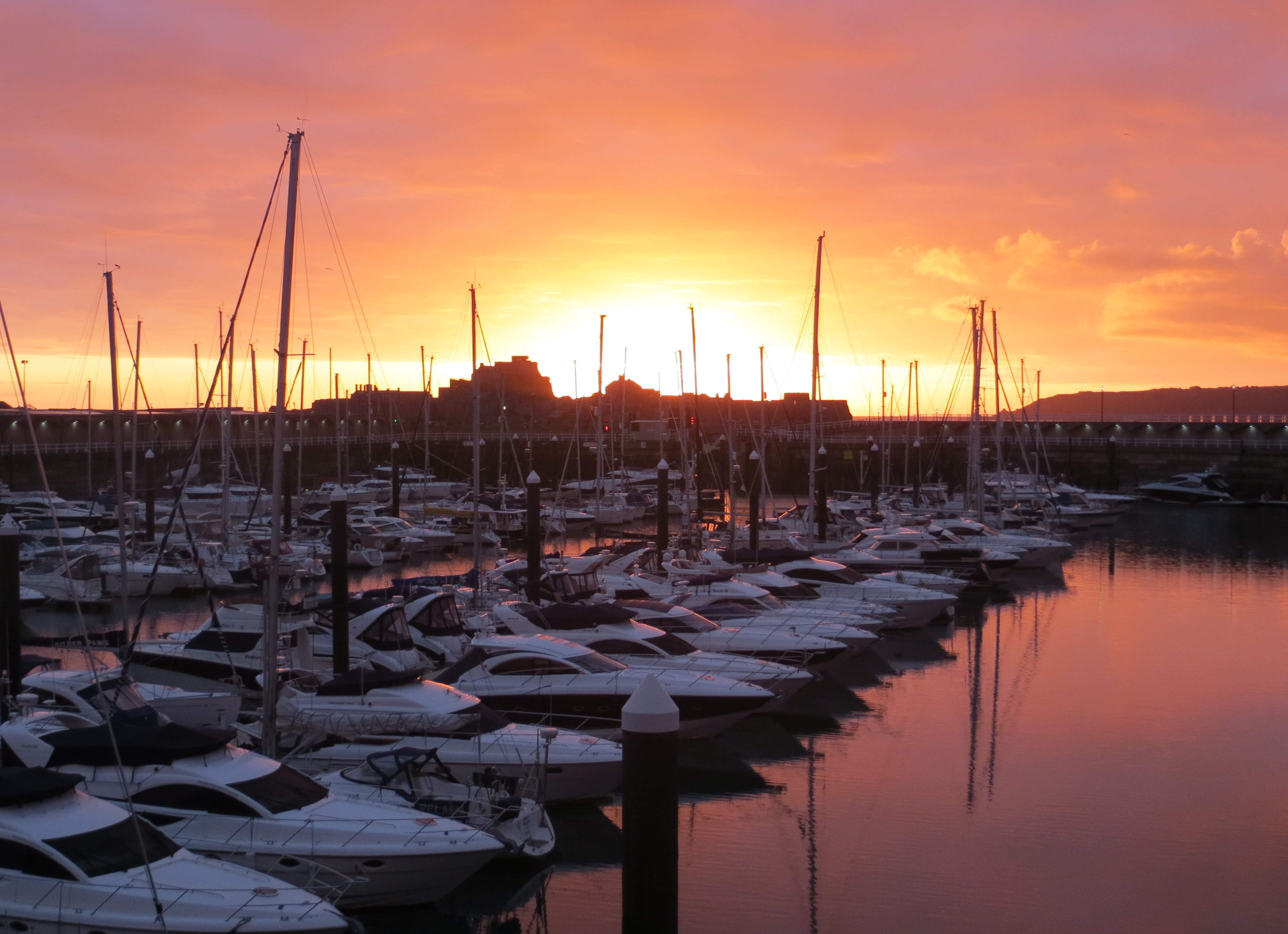 Nrf: Saint Hélyi, Jèrri, Dézembre 2013